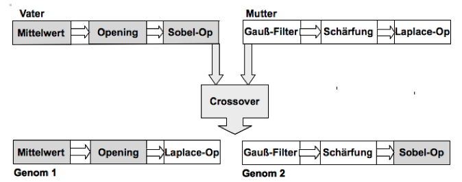 Rekombination bei der evolutionären Bildverarbeitung